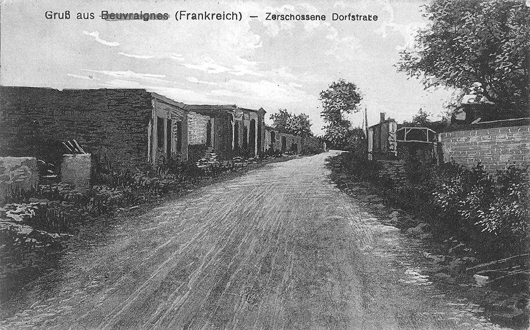 Feldpostkarte aus dem 1. Weltkrieg (ca. 1916) mit dem Titel "Gruß aus Beuvraignes - Zerschossene Dorfstraße"